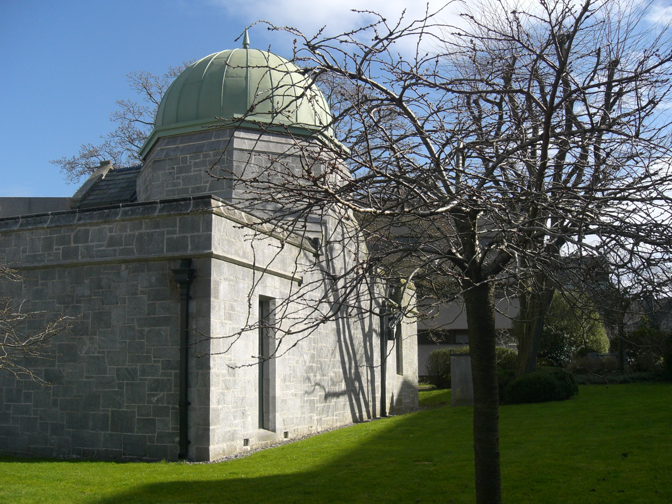 Crawford Observatory situé sur le campus de UCC, Cork